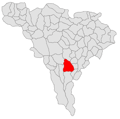 Categorie:Hărţi ale judeţului Alba